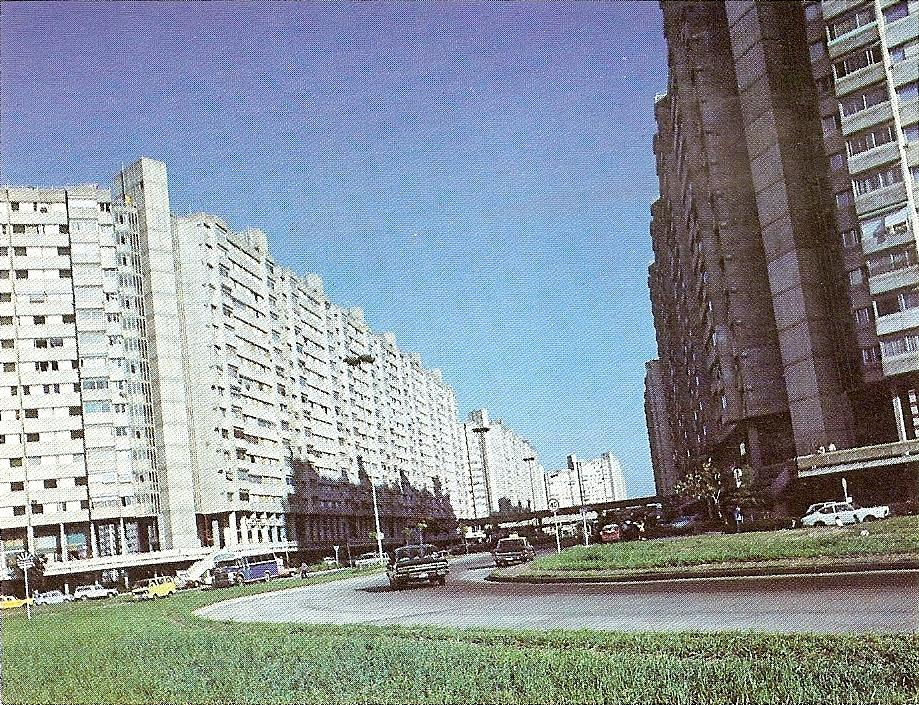 La Av. Soldado de la Frontera, calle principal del Conjunto Habitacional Lugano 1 y 2 (General Manuel Savio), construido hacia 1970 por la Comisión Municipal de la Vivienda. Buenos Aires, Argentina.